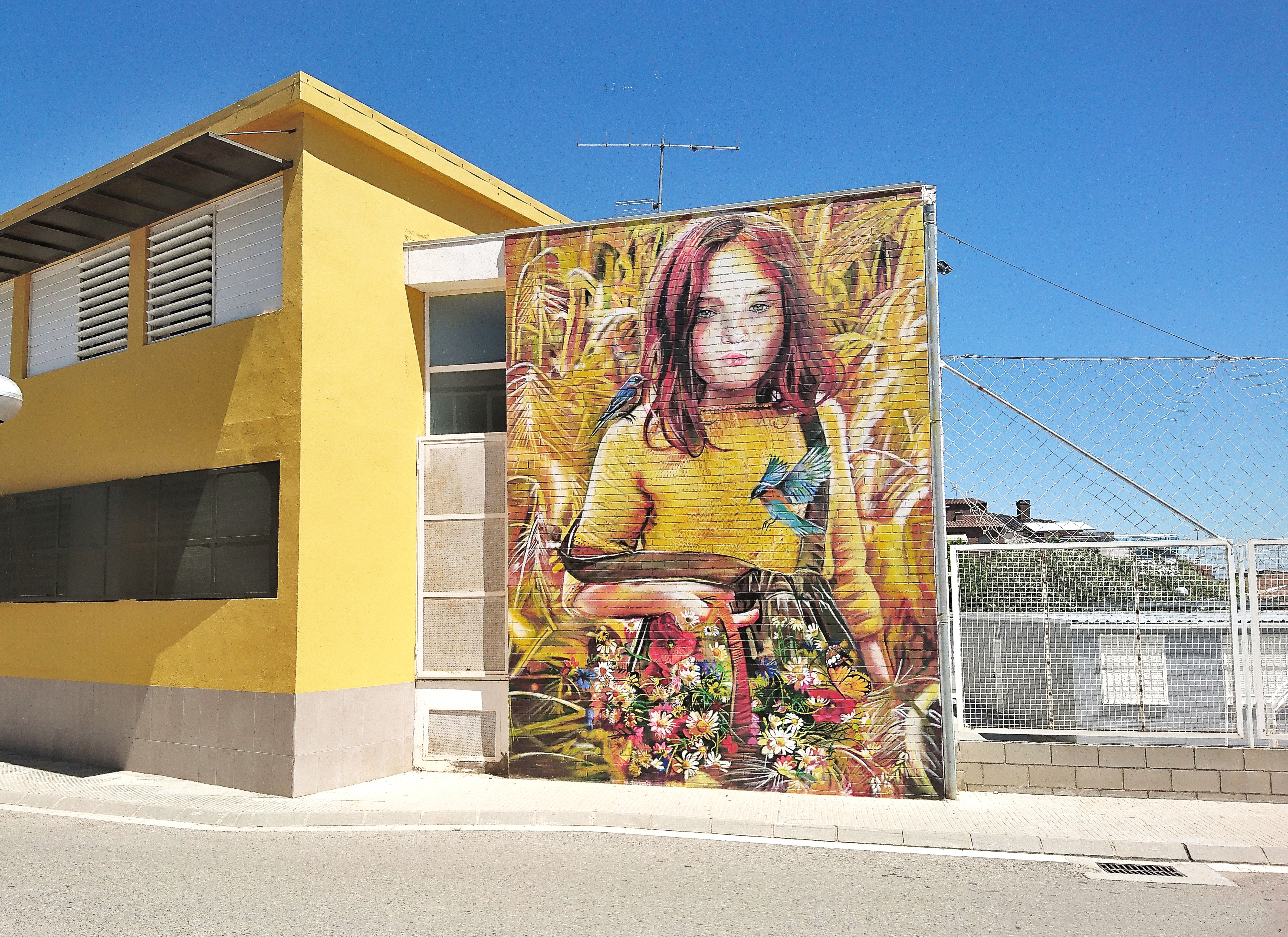 Mural "Magda" Lily Brick (Alcoletge-Lleida)